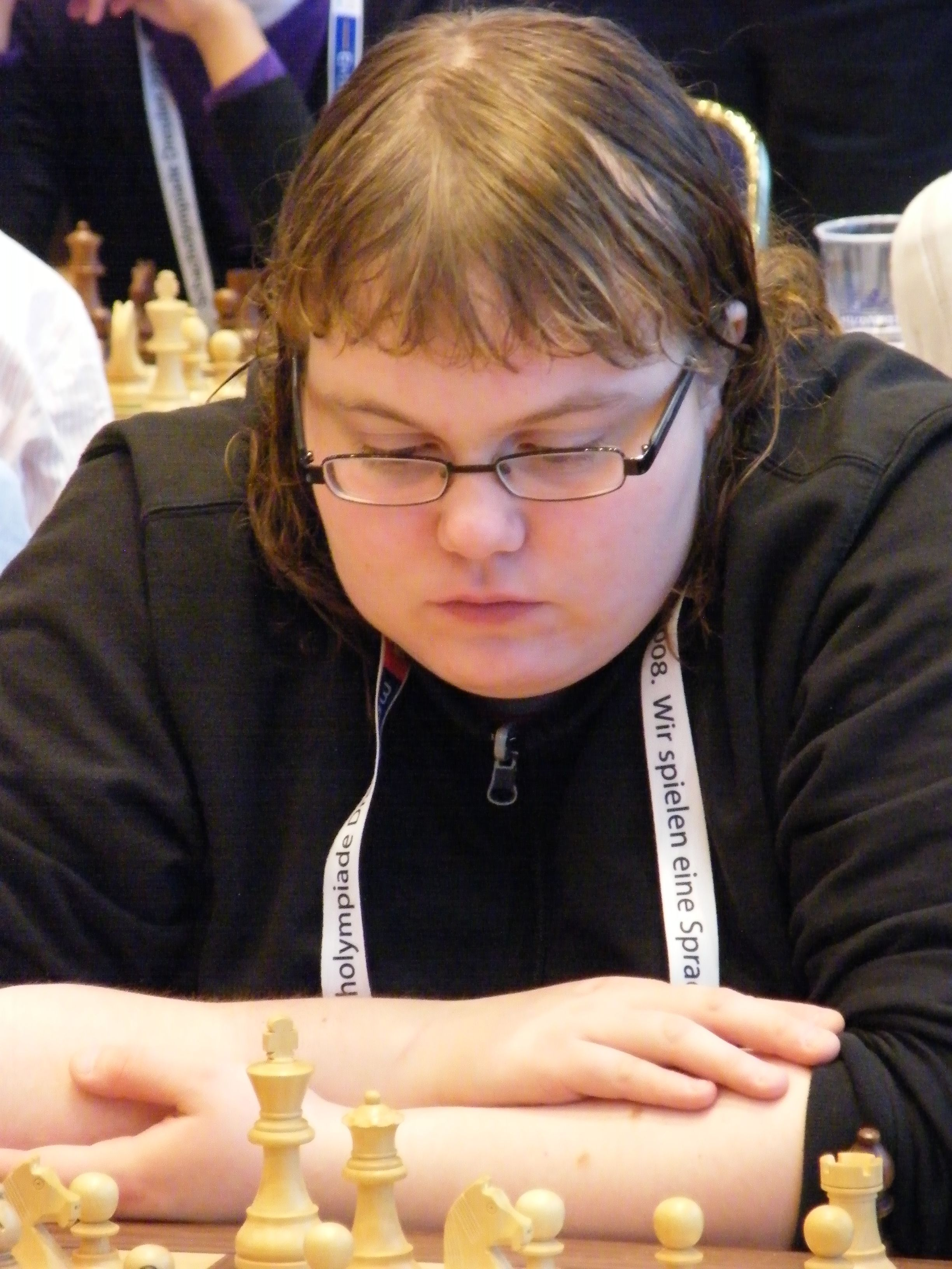 Elsa Maria Kristinardottir bei der 38. Schacholympiade in Dresden 2008